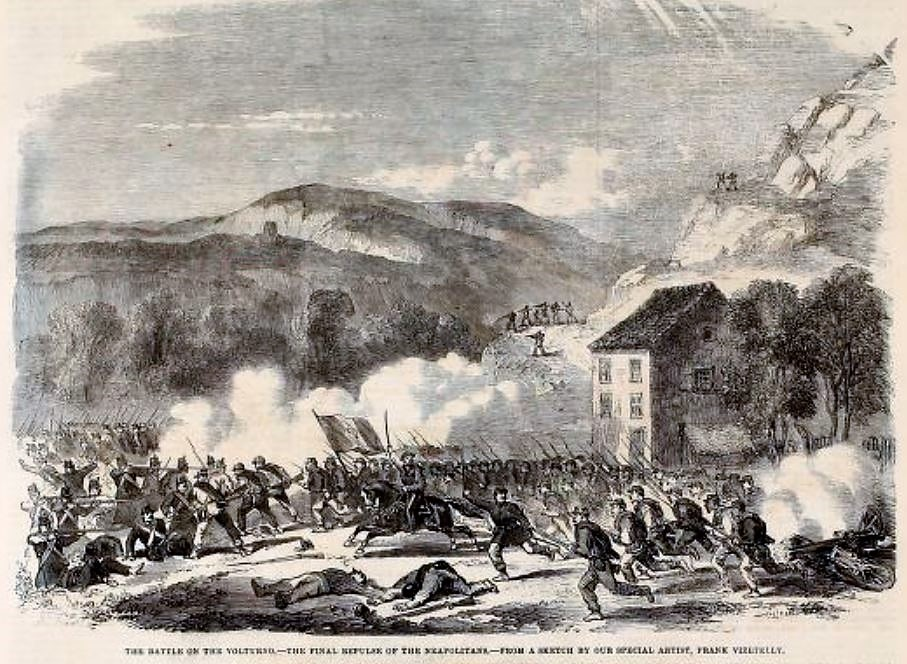 Disegno Battaglia del Volturno fase finale